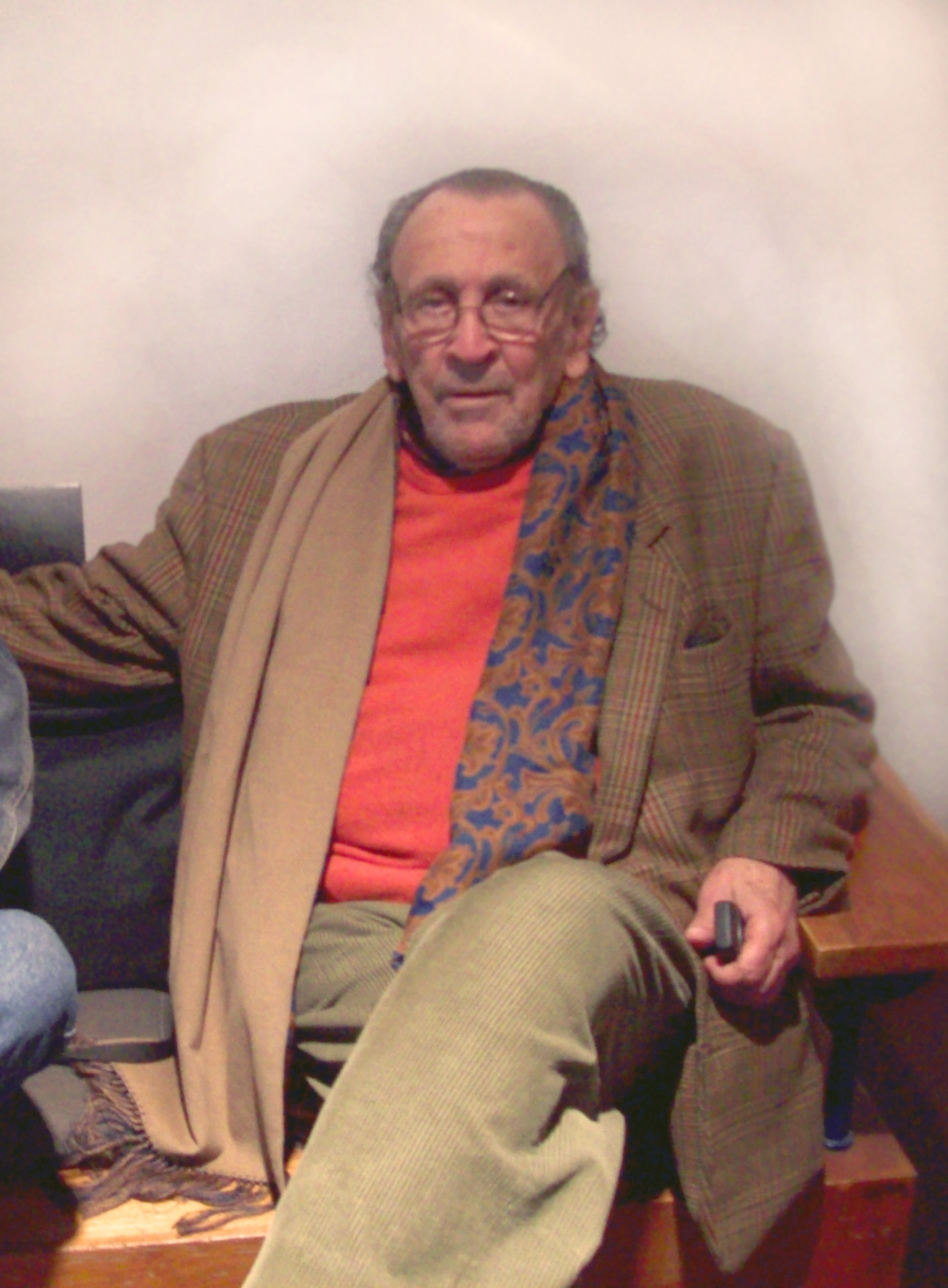 El productor editorial y musical argentino Jorge Álvarez, en la Biblioteca Nacional, Buenos Aires 2012.